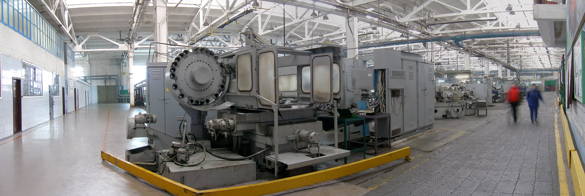 Первый механосборочный цех Полтавского автоагрегатного завода